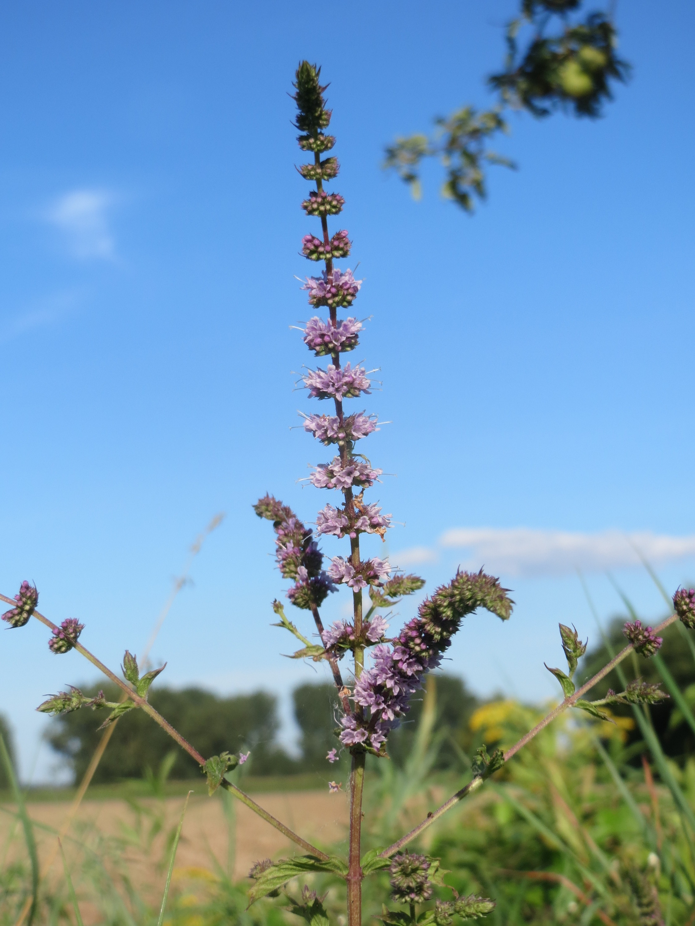 Grüne Minze (Mentha spicata) bei Hockenheim